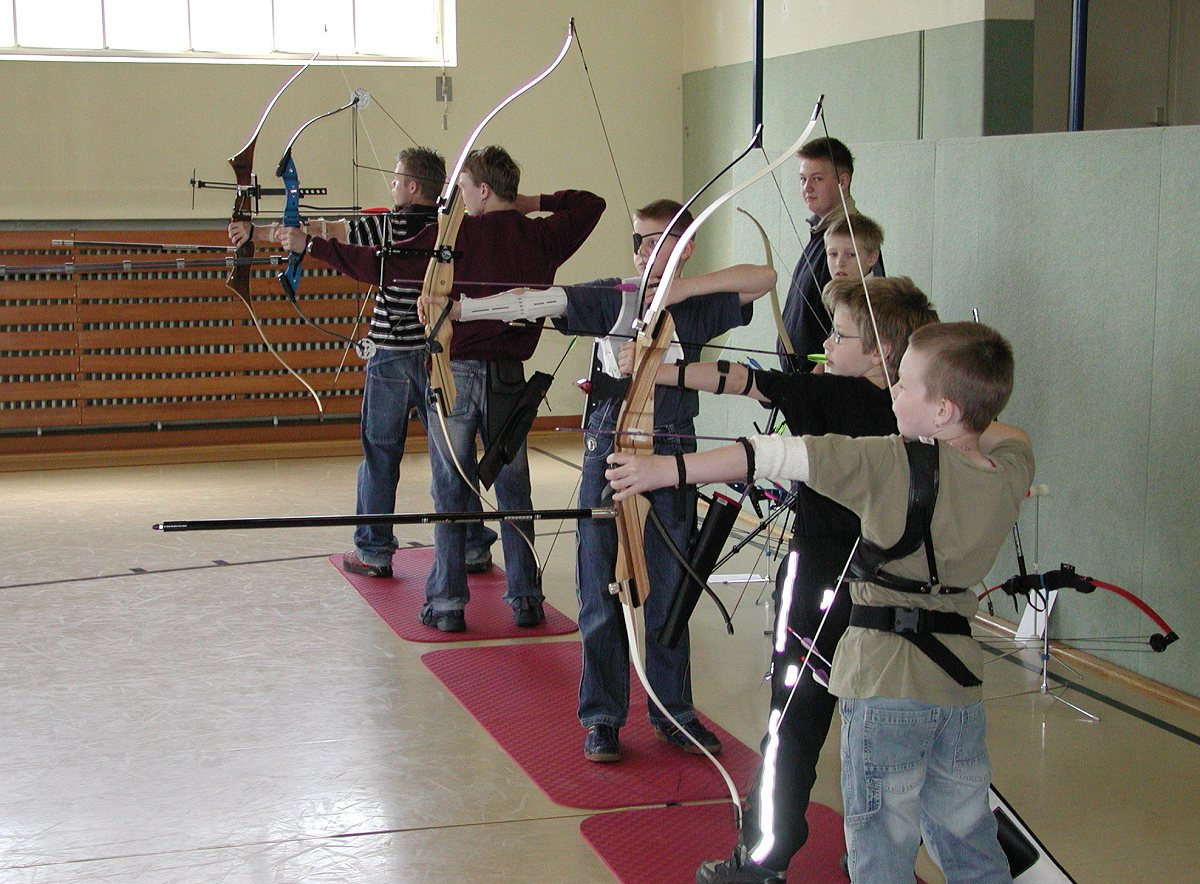 Bogenschießen in der Halle Bogenschießen mit Compound-Bogen (hinten) und Recurve-Bogen (vorne)